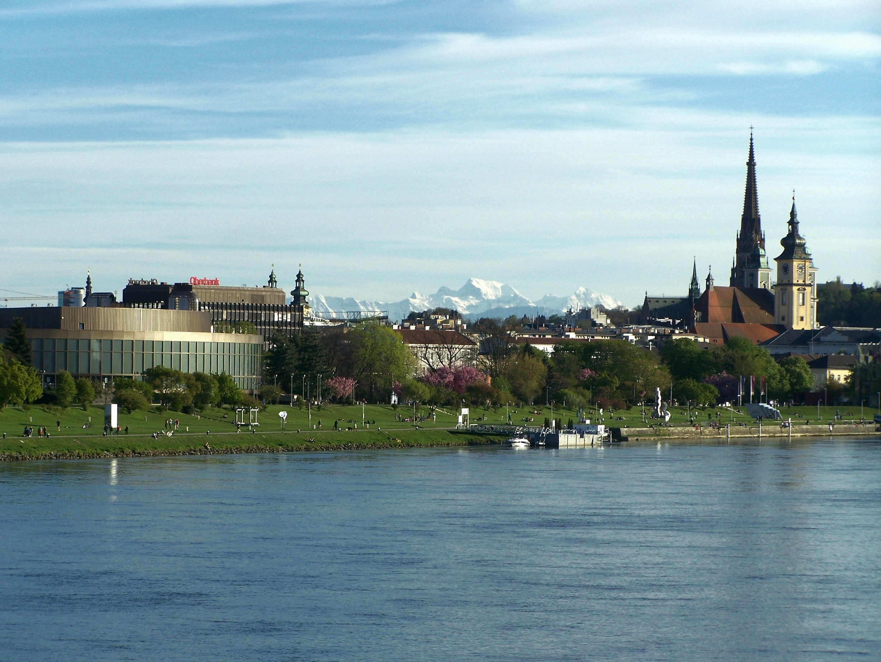 Brucknerhaus